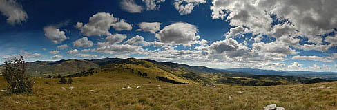 Volovja reber pokrajina